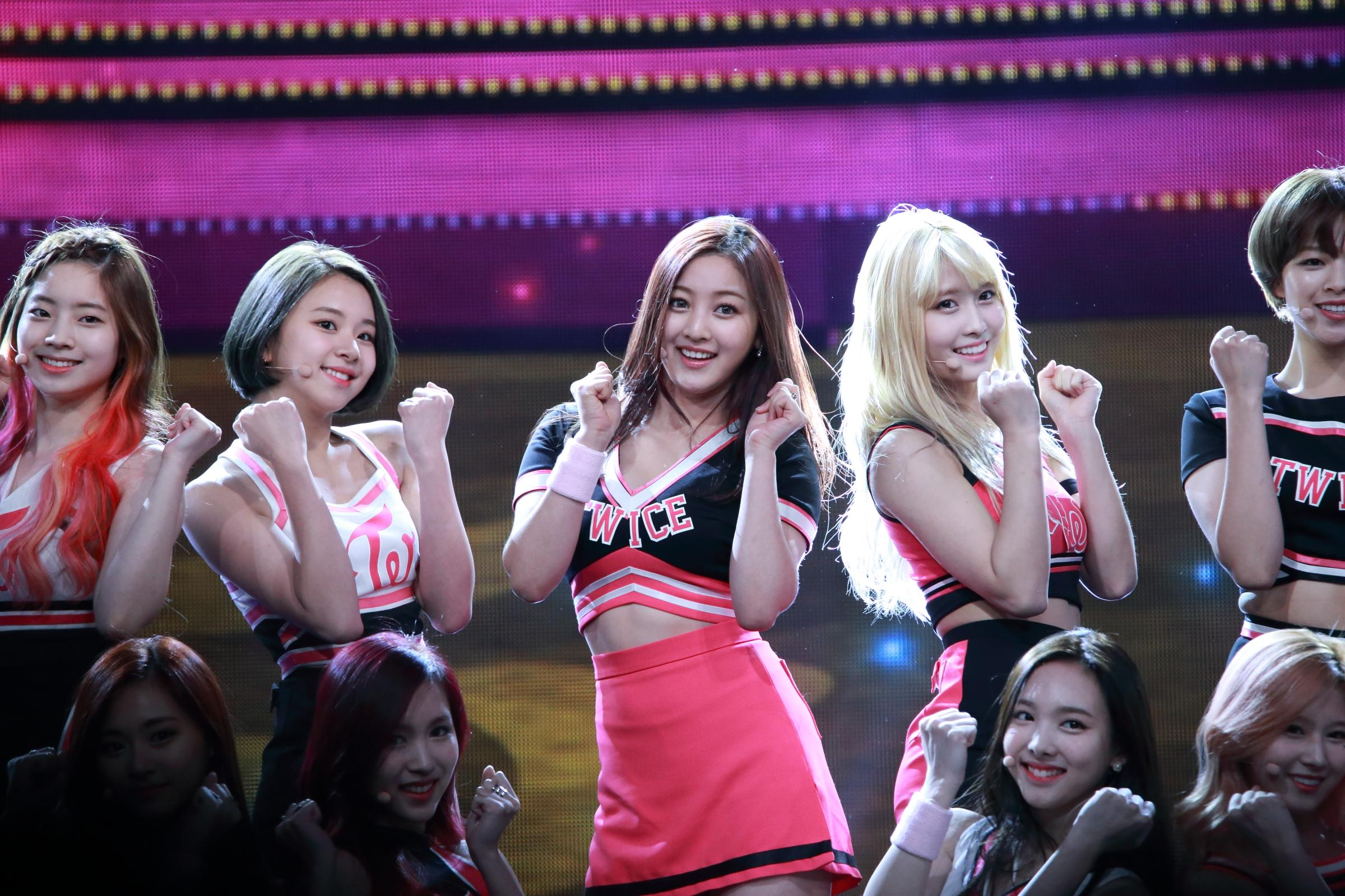 151208. 2015 KBO 골든 글러브 시상식.